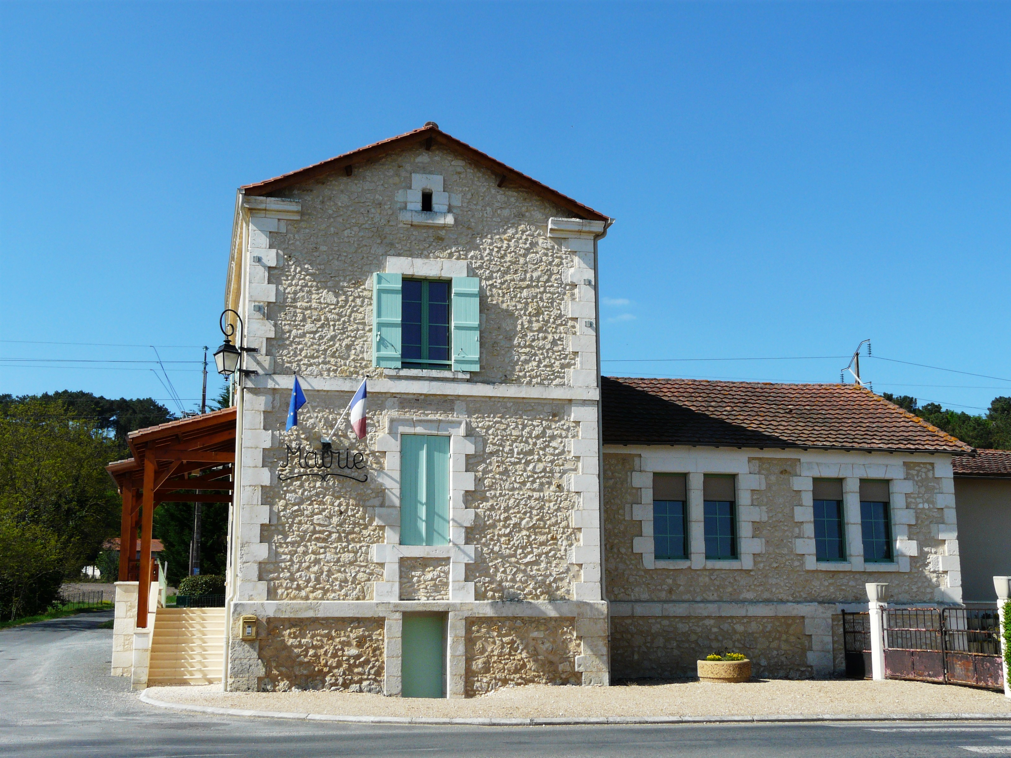 La mairie de Saint-Martin-l'Astier, Dordogne, France.